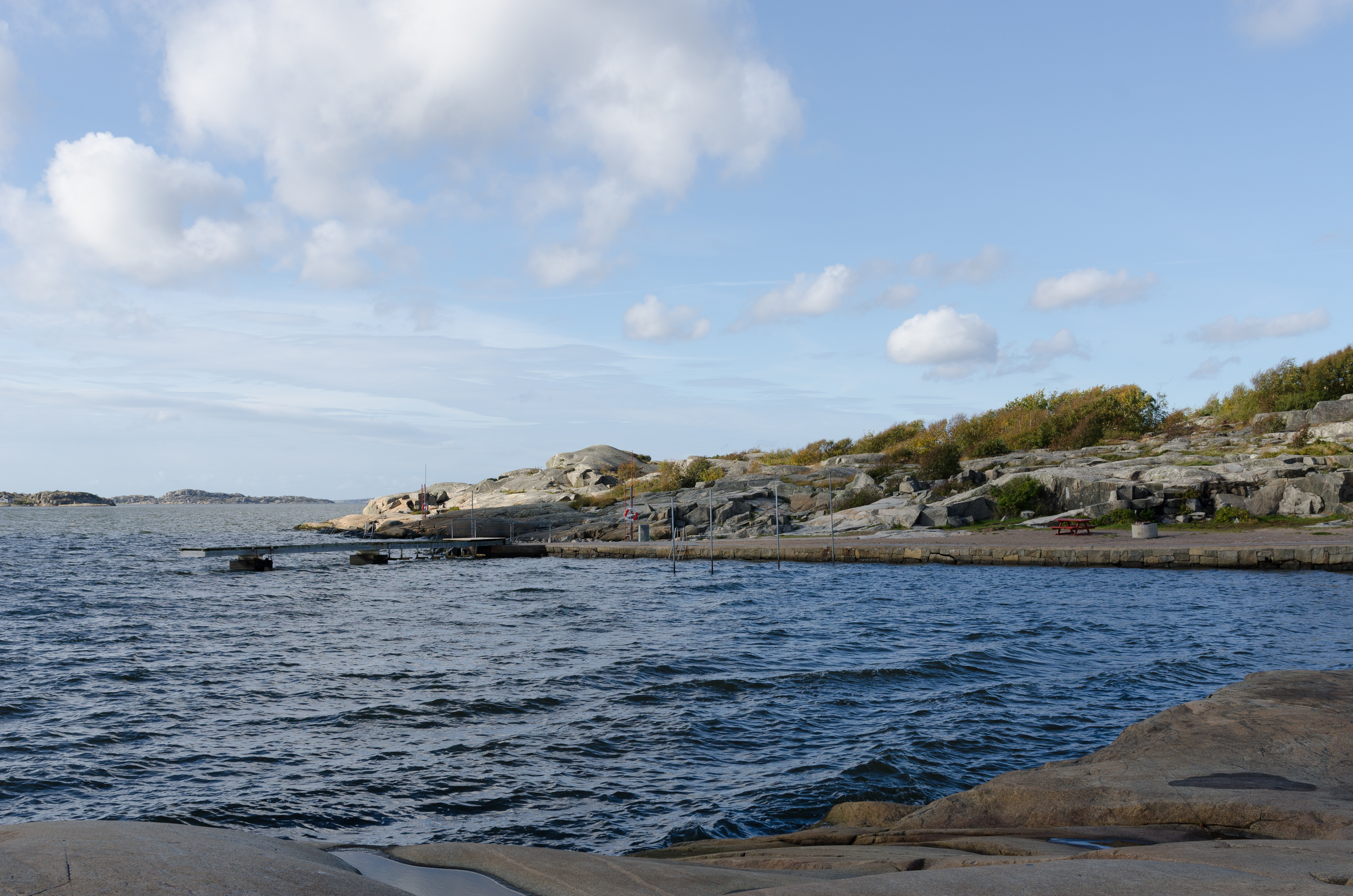 Badstrand, Fiskebäck.